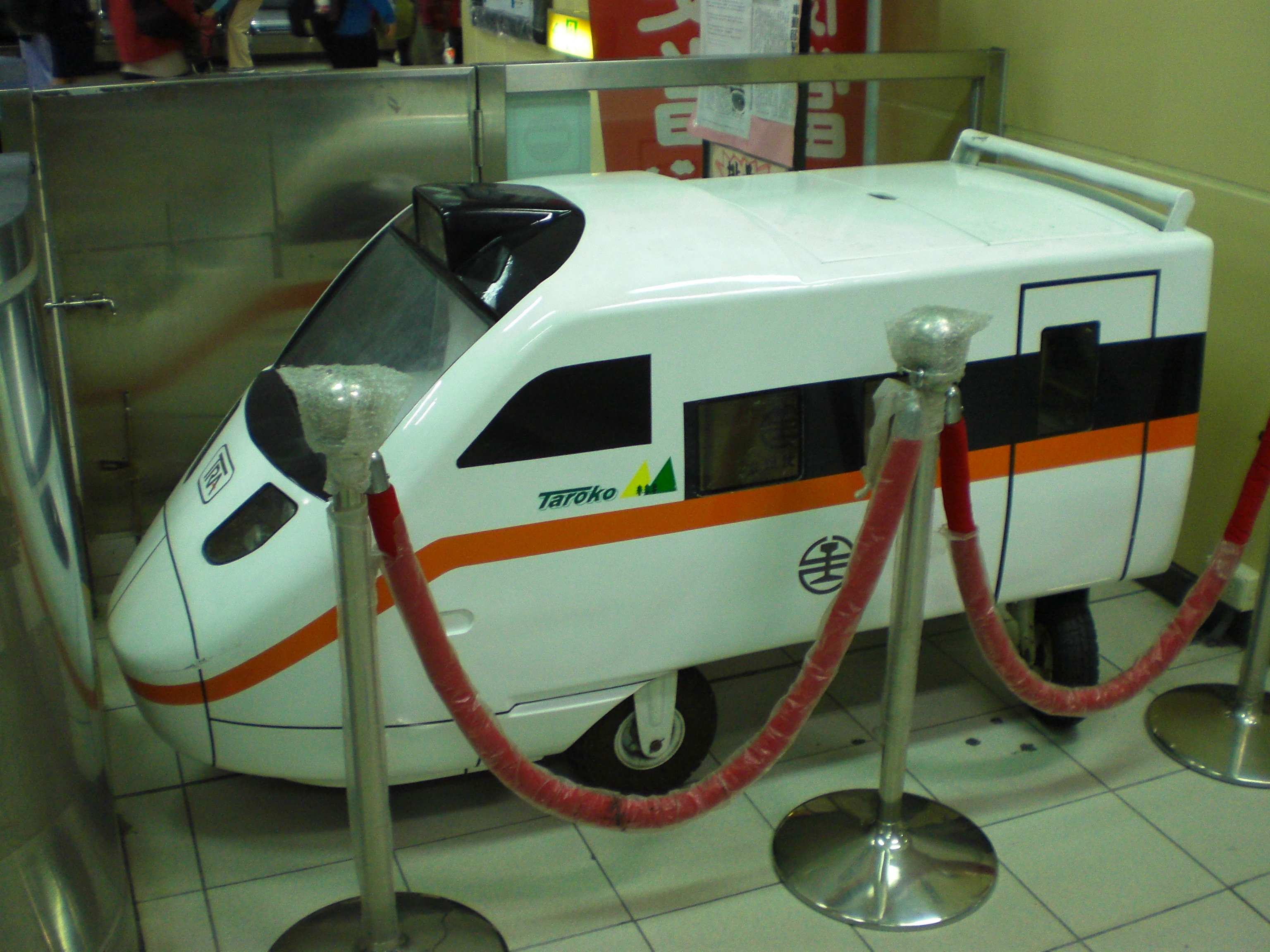 臺灣鐵路管理局汐止車站的Q版太魯閣號餐車。